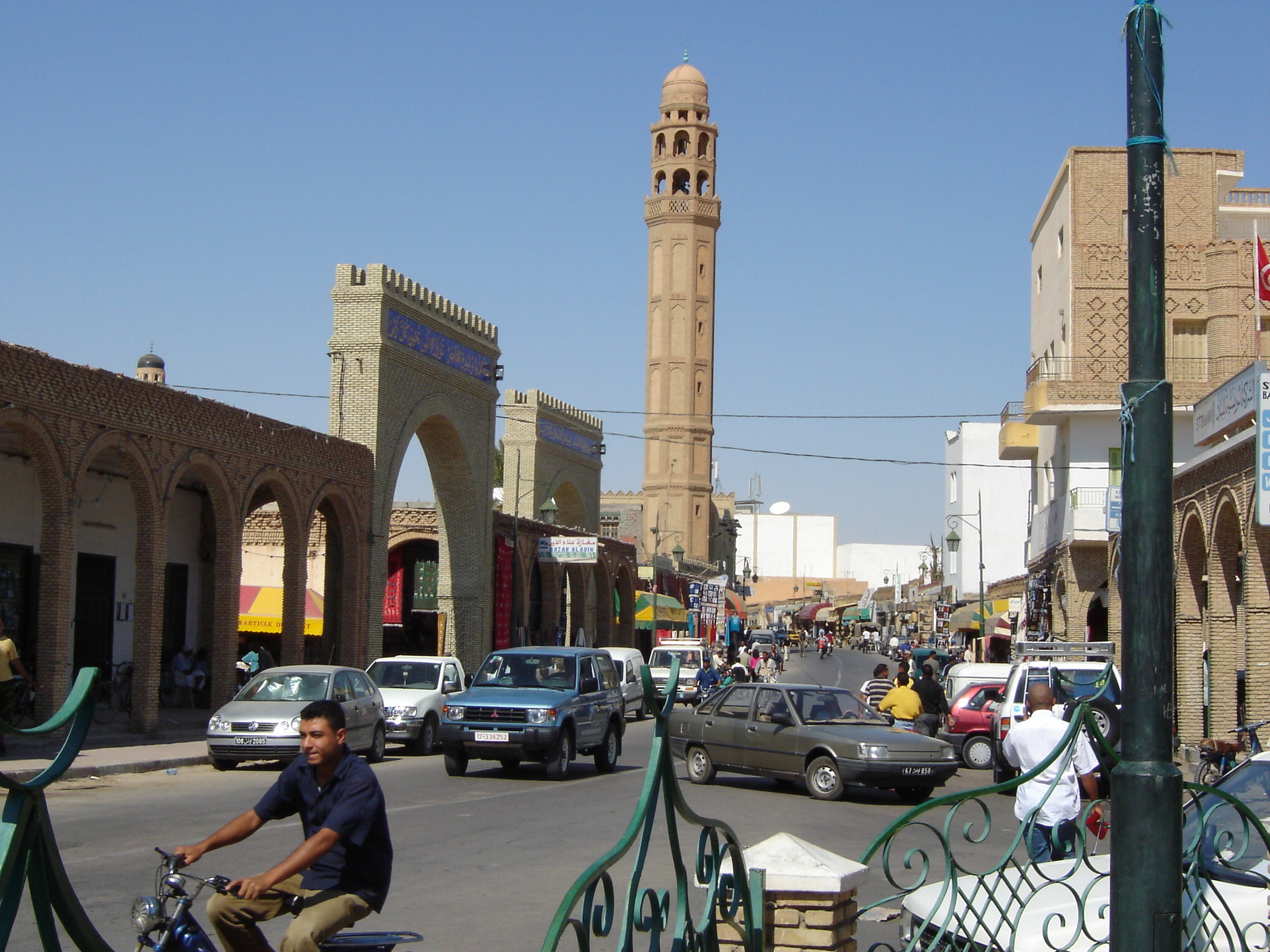 Avenue Habib Bourguiba, Tozeur, Tunisia